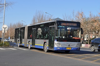 中文（中国大陆）: 拍摄于白堆子附近